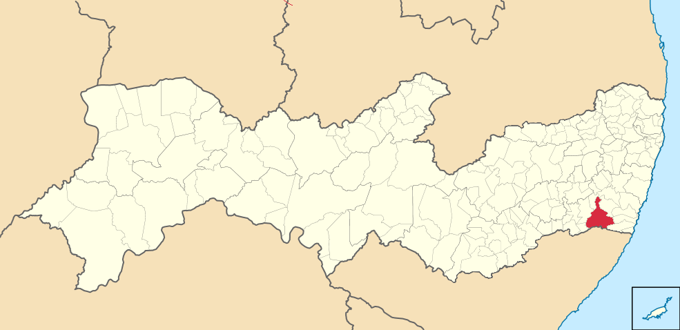 Mapa de Água Preta (2)